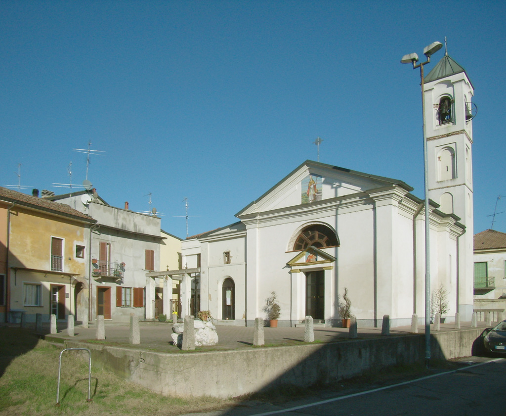 La fraz. San Grato di Lodi, con la chiesa di Maria SS. Bambina